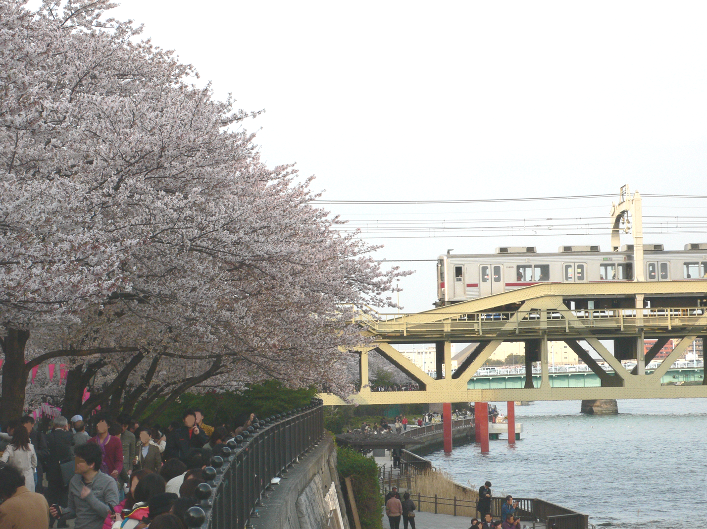 隅田公園。(台東区側)、東武伊勢崎線。(10000系)、隅田川。